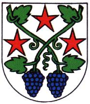 Wappen von Conthey, Wallis Ralf Hartemink 1996